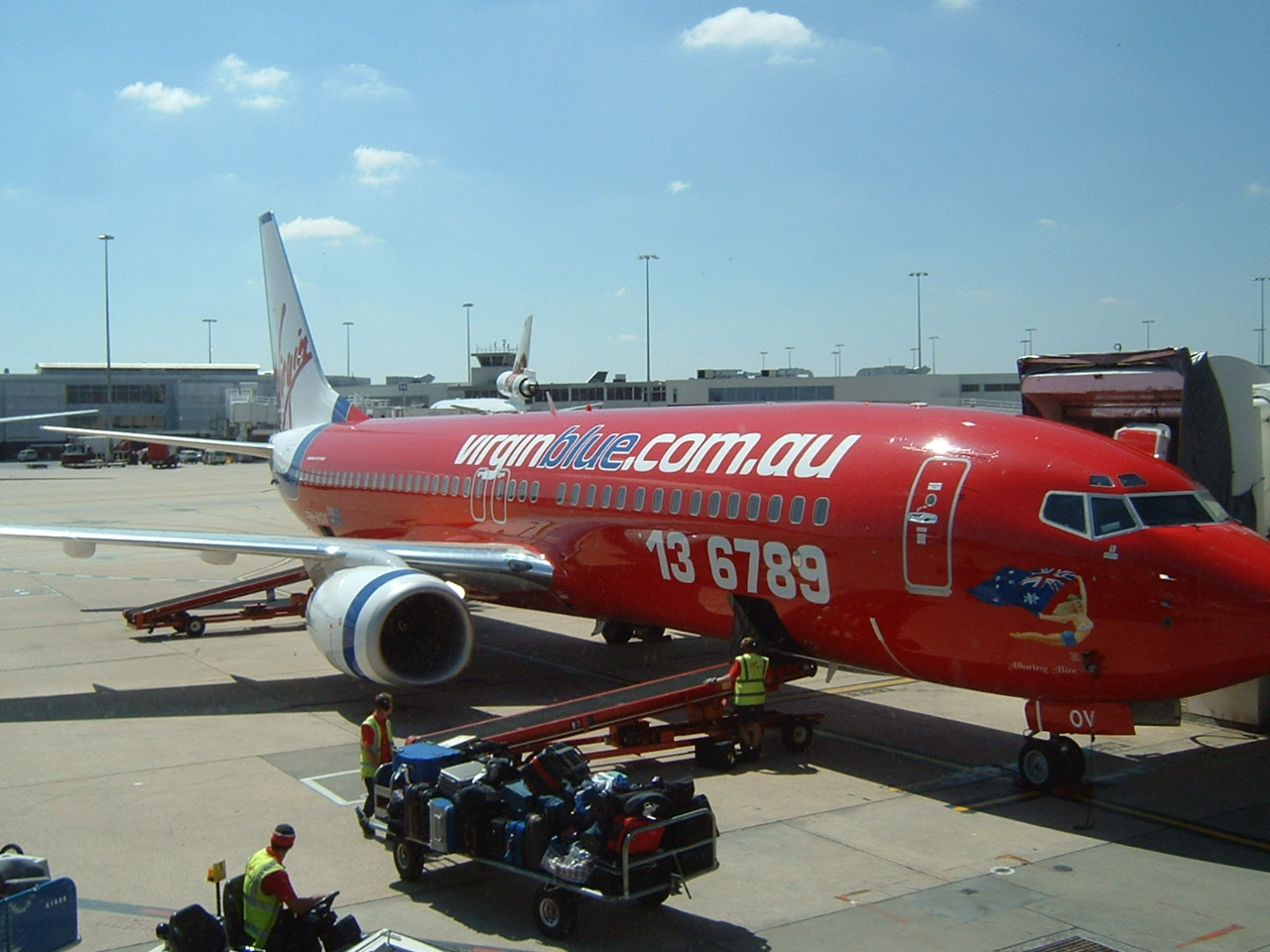 Virgin Blue Boeing 737-800 at Melbourne